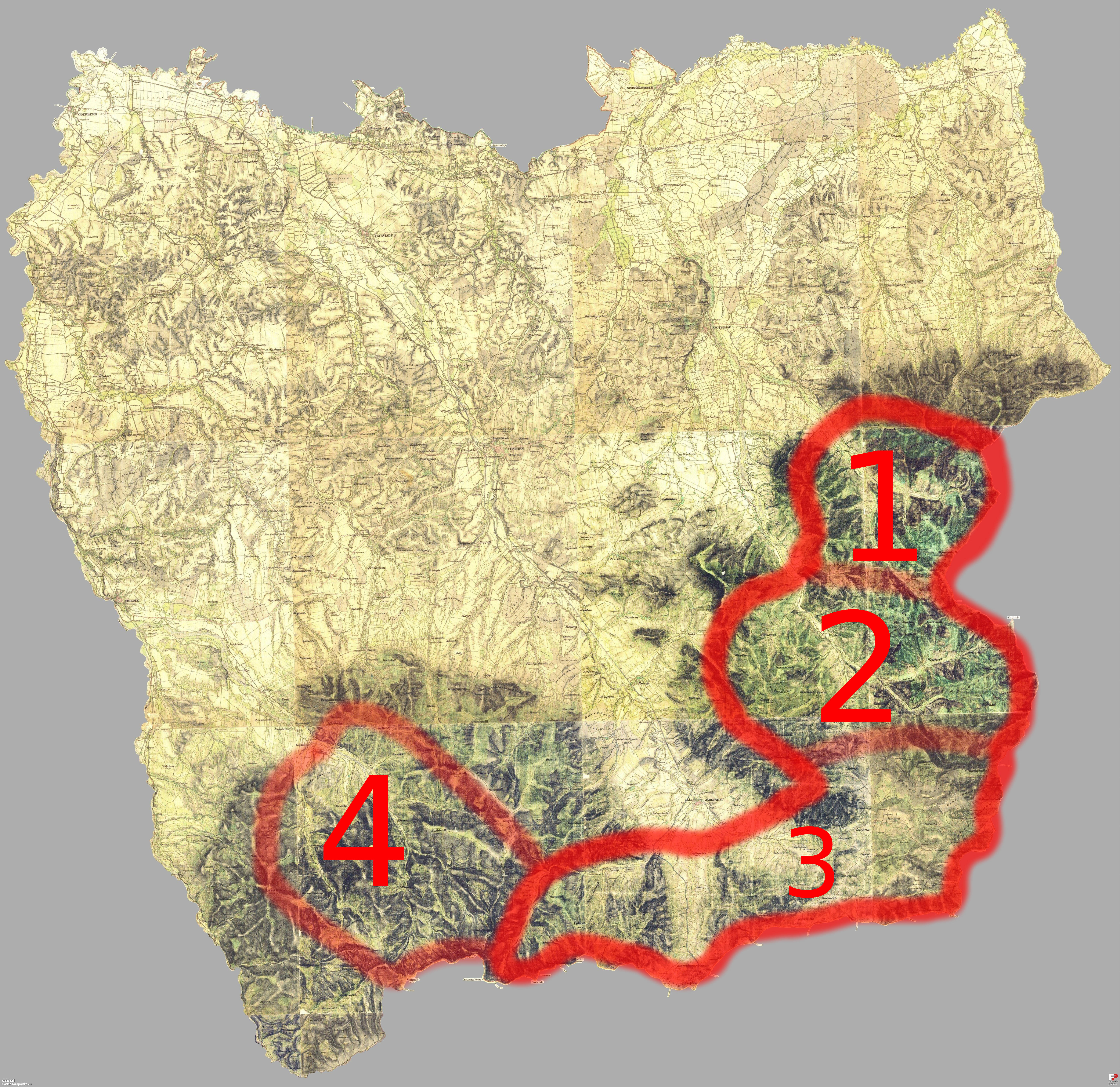 Górale śląscy na mapie austriackiej (1836-1852)